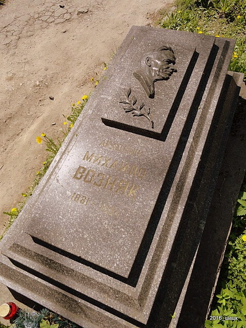 Памятник на могиле Михаила Степановича Возняка (1881—1954) — украинского литературоведа, академика АН УССР с 1929 г. во Львове на Лычаковском кладбище